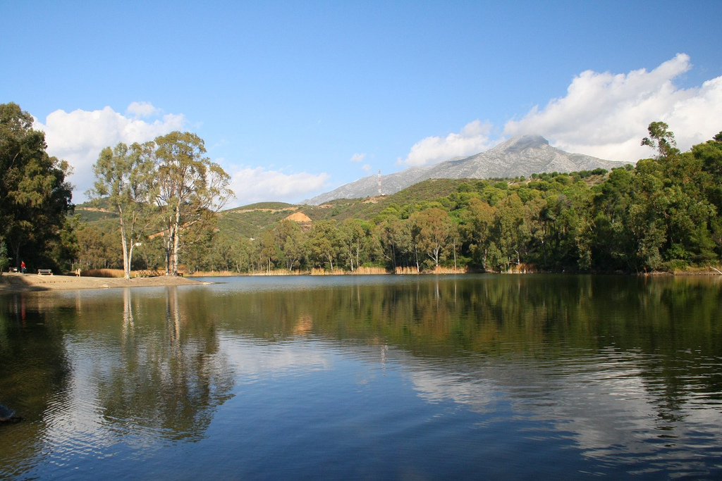 Lago de las Tortugas, Marbella, Spain.